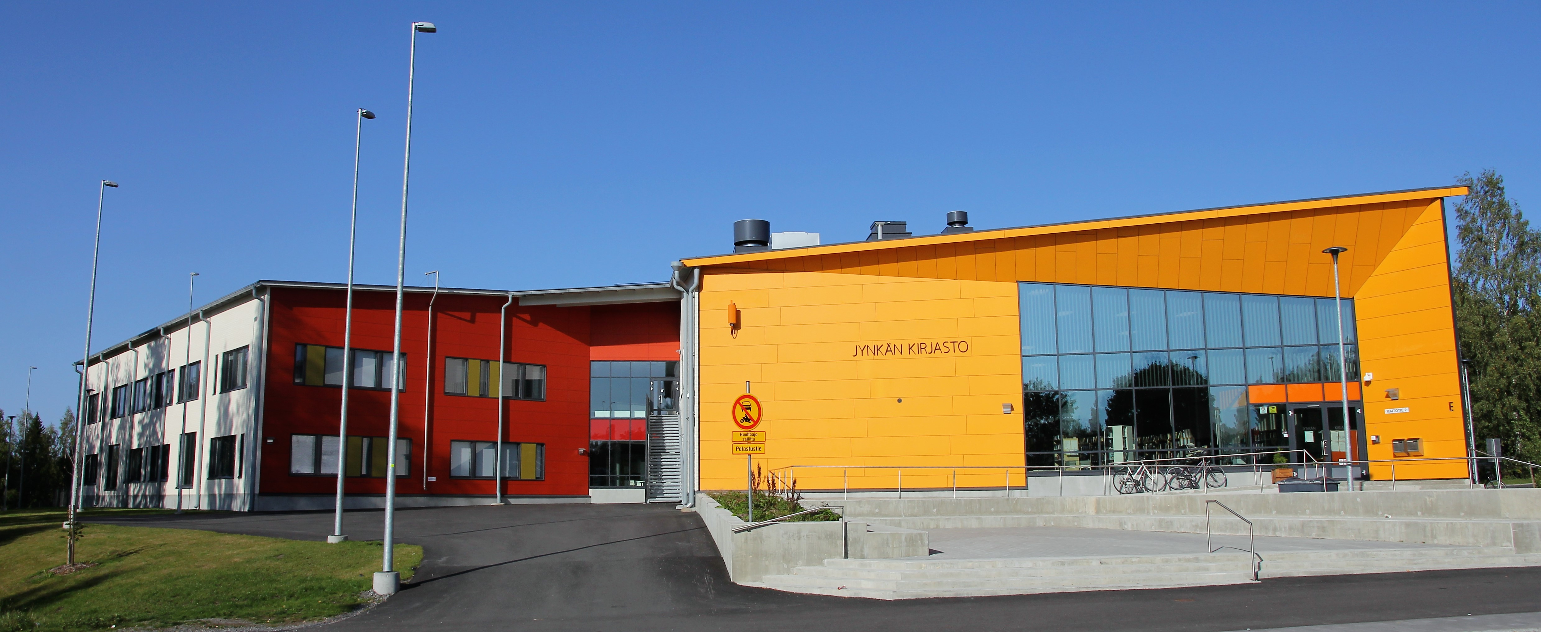 Jynkän koulun ja Jynkän kirjaston rakennus osoitteessa Maitotie 2, Kuopion Jynkän kaupunginosassa.